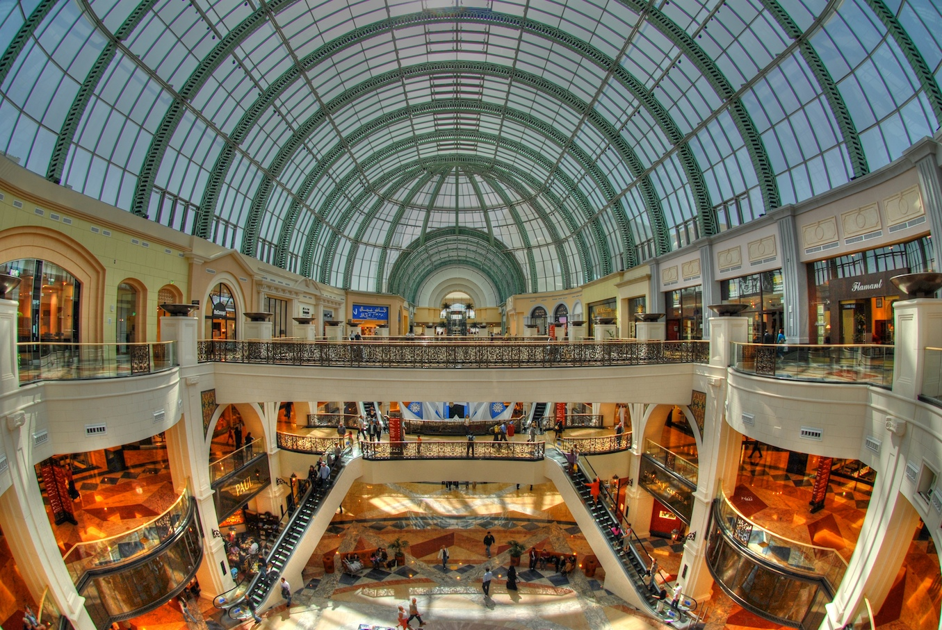 Dubai, UAE